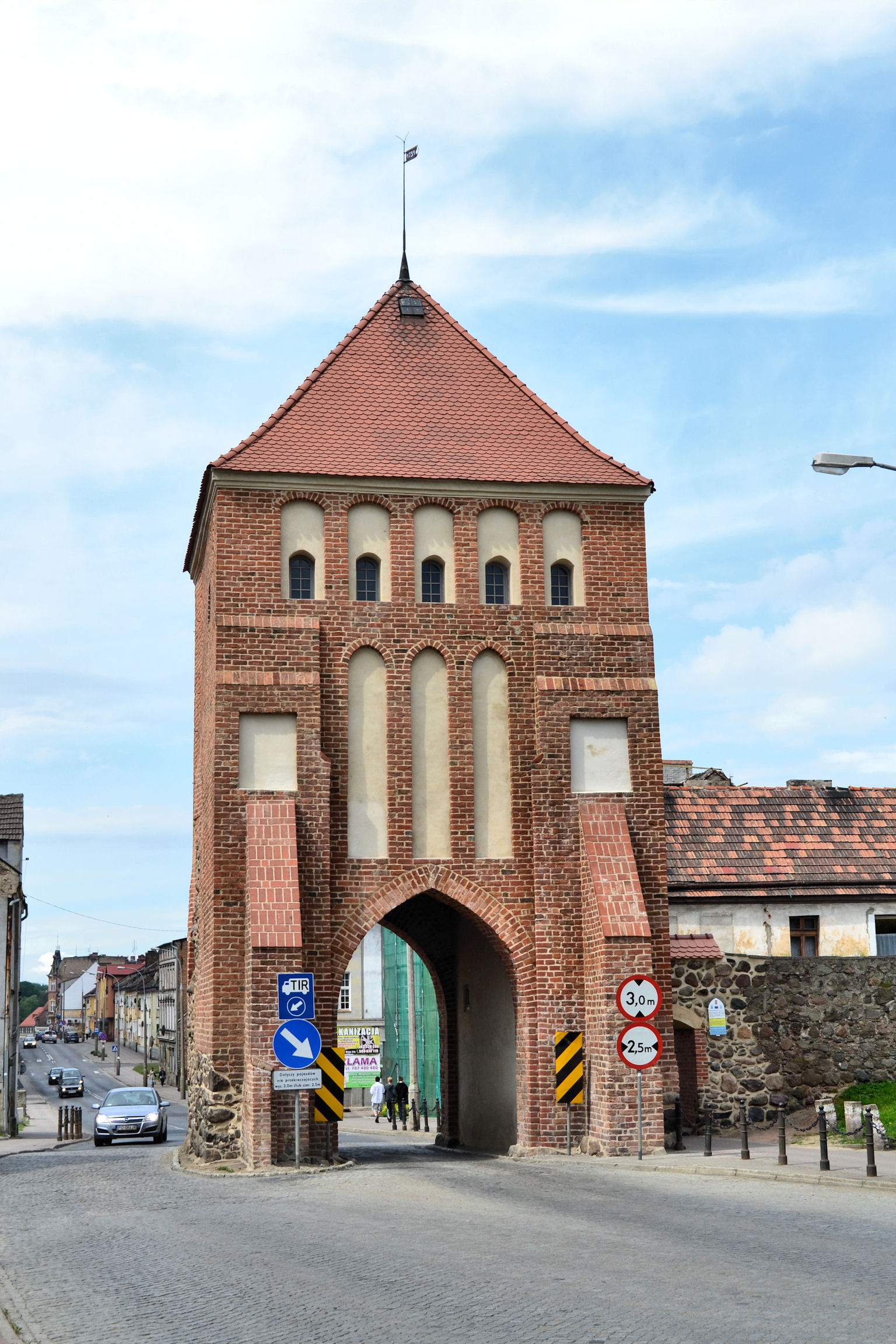 Myślibórz - Brama Nowogródzka